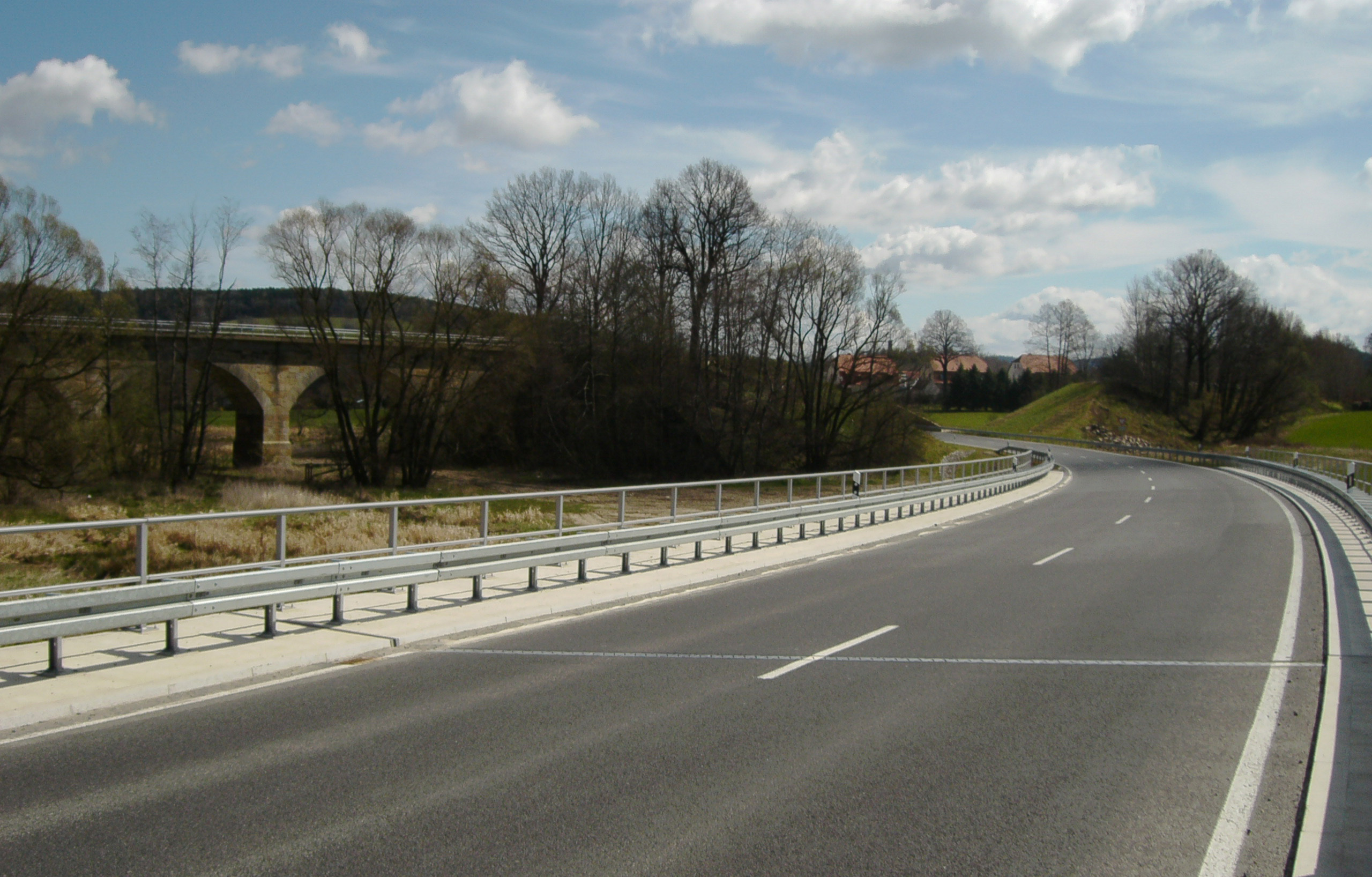 Staatsstraße 156, Umgehungsstraße Bischofswerda − Neustadt in Sachsen mit Unterbrechung der Bahnstrecke Bautzen − Bad Schandau